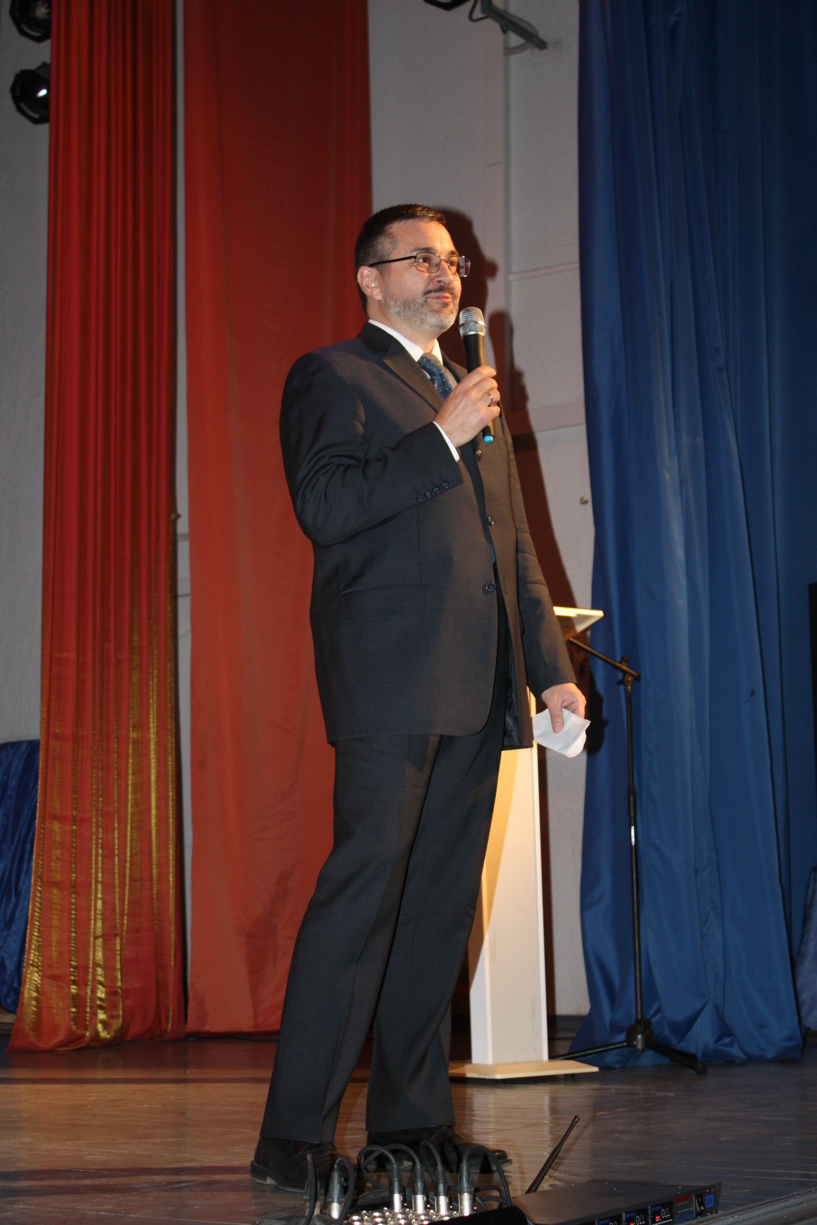 Бессменный организатор Всероссийской олимпиады по географии Алексей Станиславович Наумов.